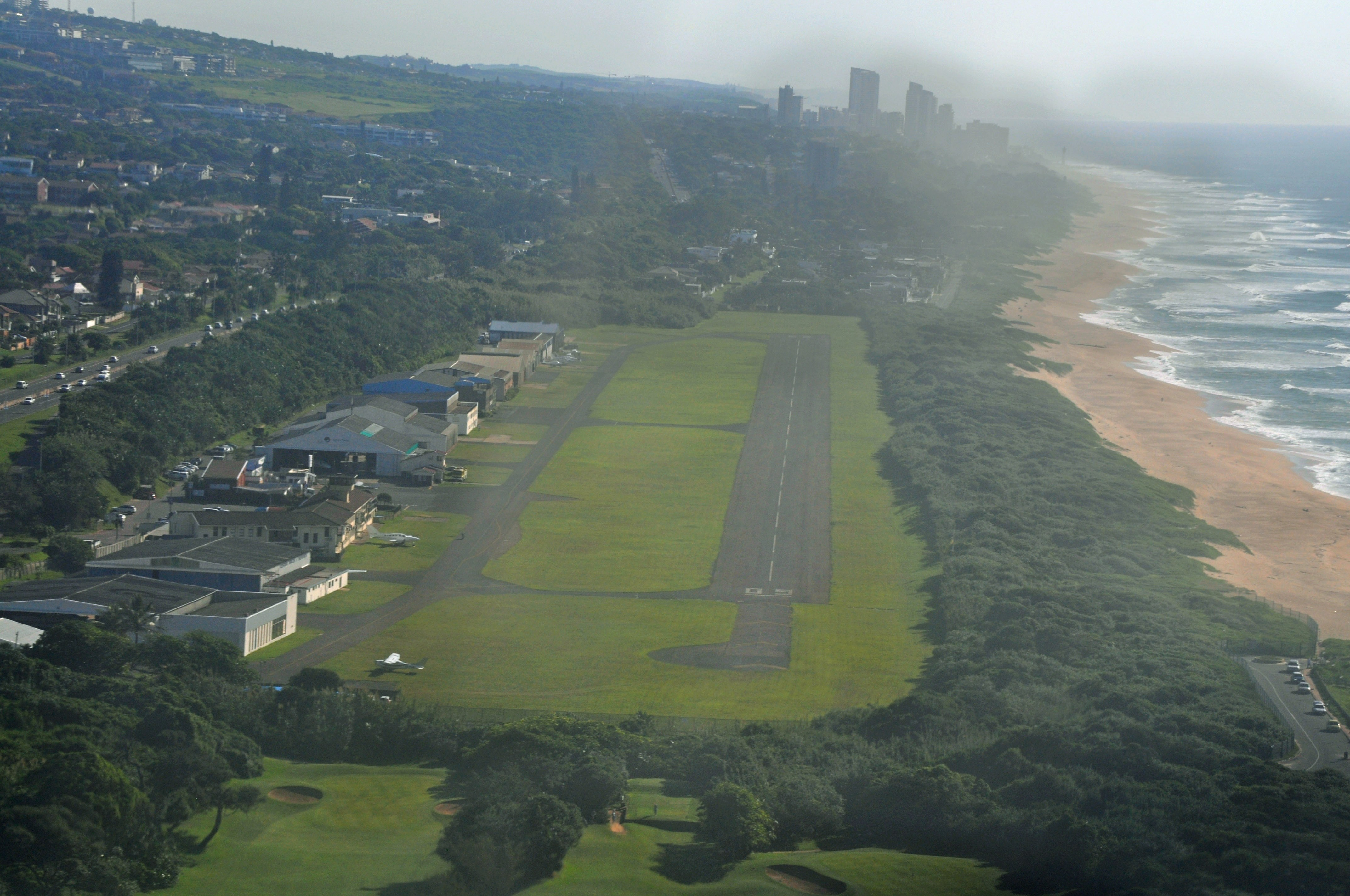 Flughafen Virginia